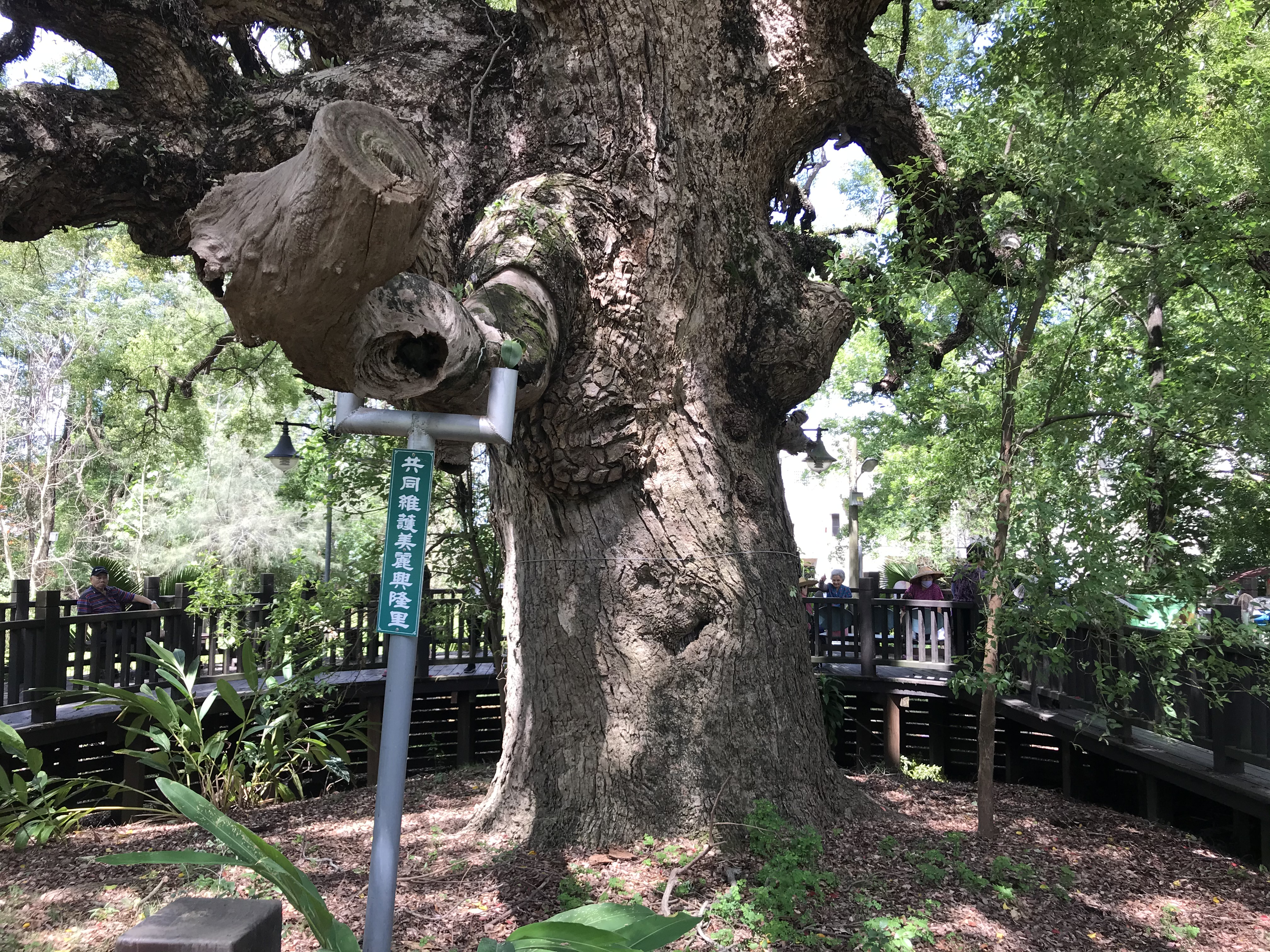 中文（台灣）: 車籠埔樟樹公樹下